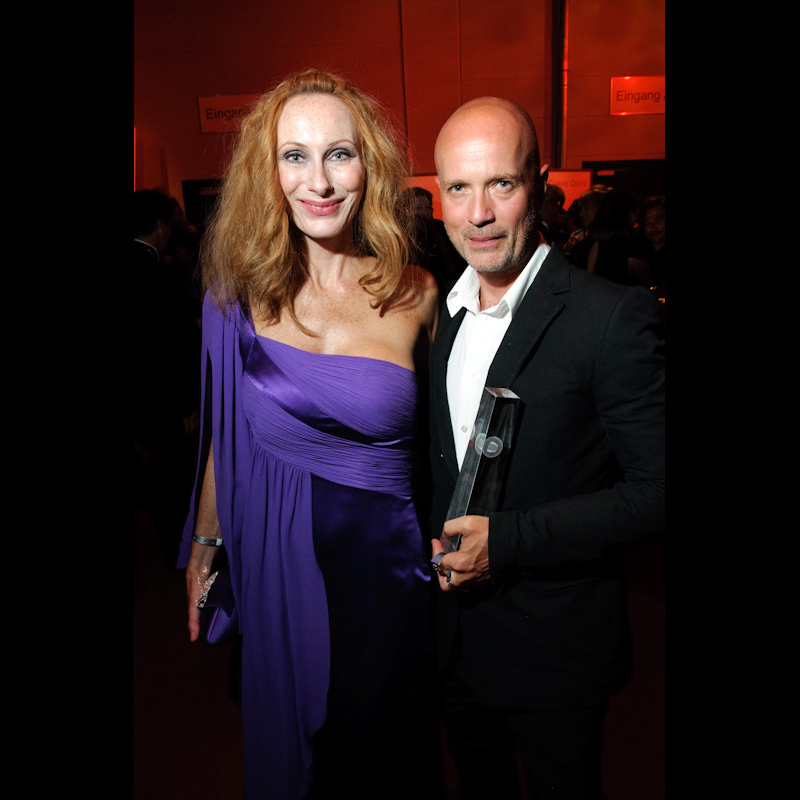 Andrea Sawatzki, Christian Berkel; Deutscher Fernsehpreis 2009